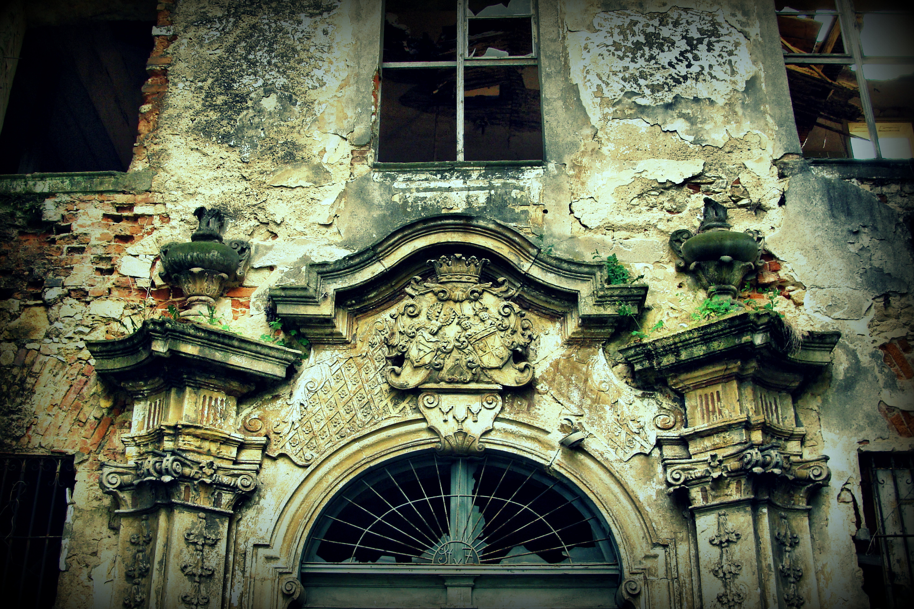 Czerńczyce, pałac, XVIII